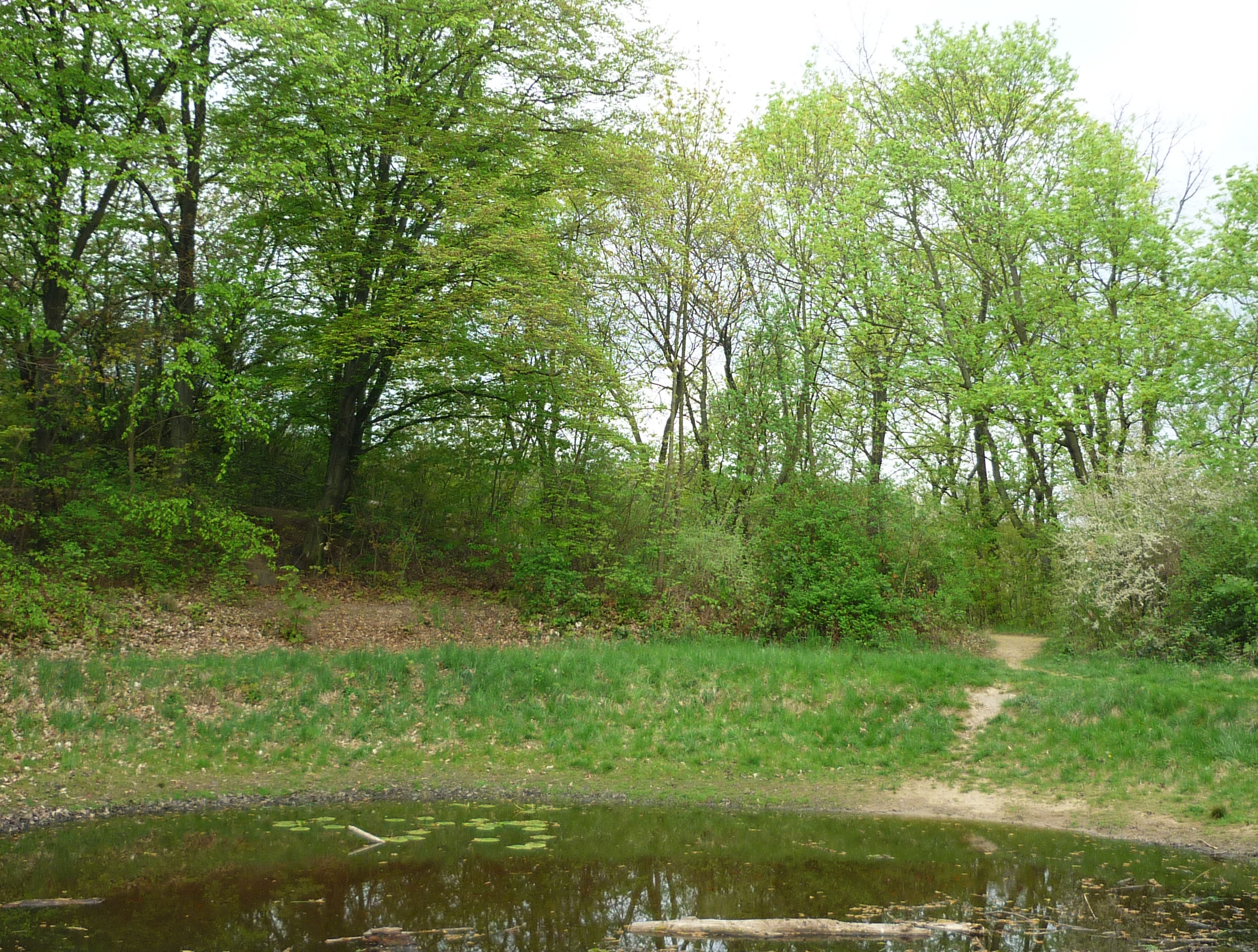 Alter Bienertpark an der Coschützer Str. in Dresden-Plauen (Hoher Stein), Teich